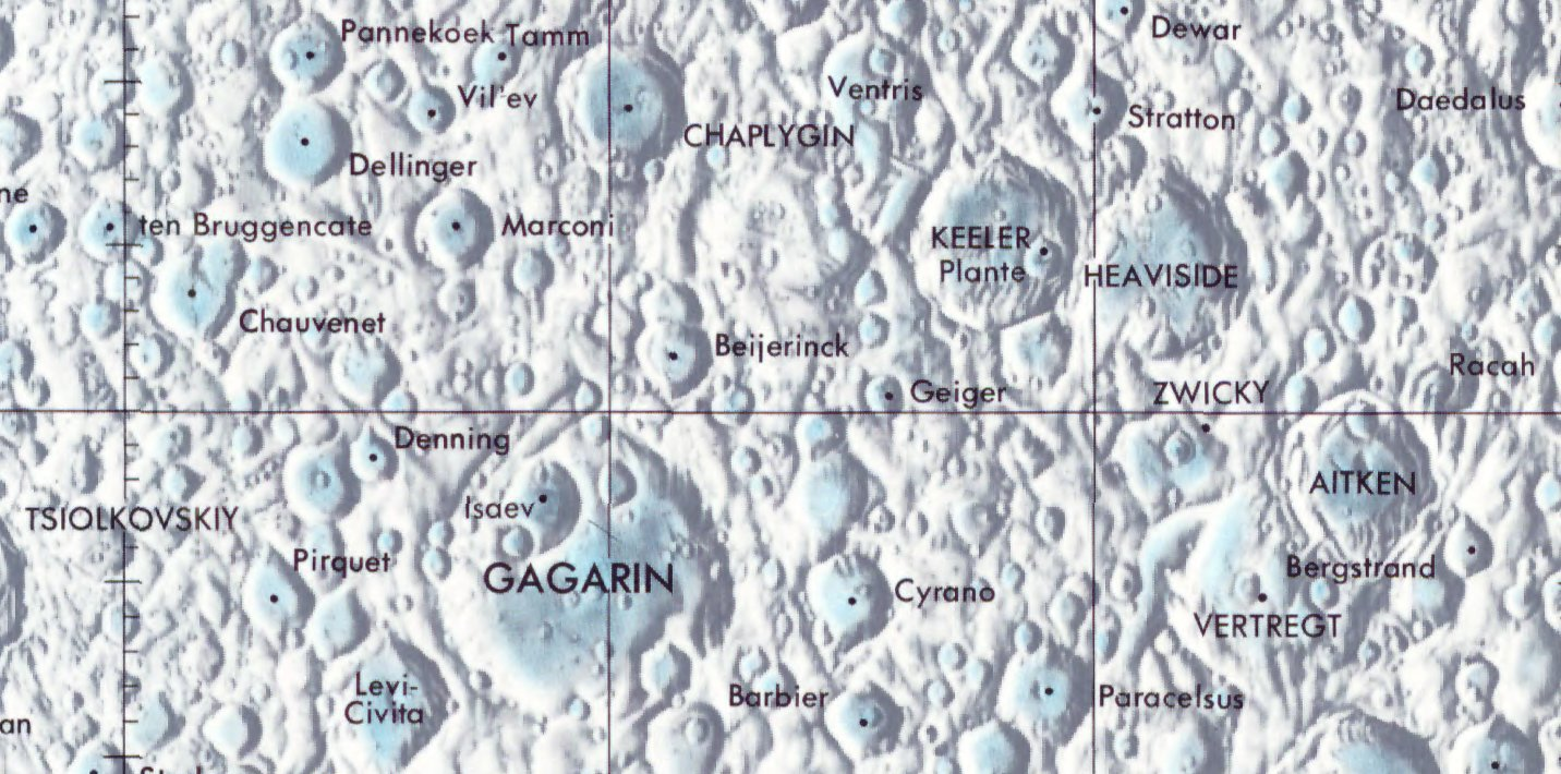 Cráter lunar Zwicku. Localización. (Lunar Chart LPC1. Second Edition)